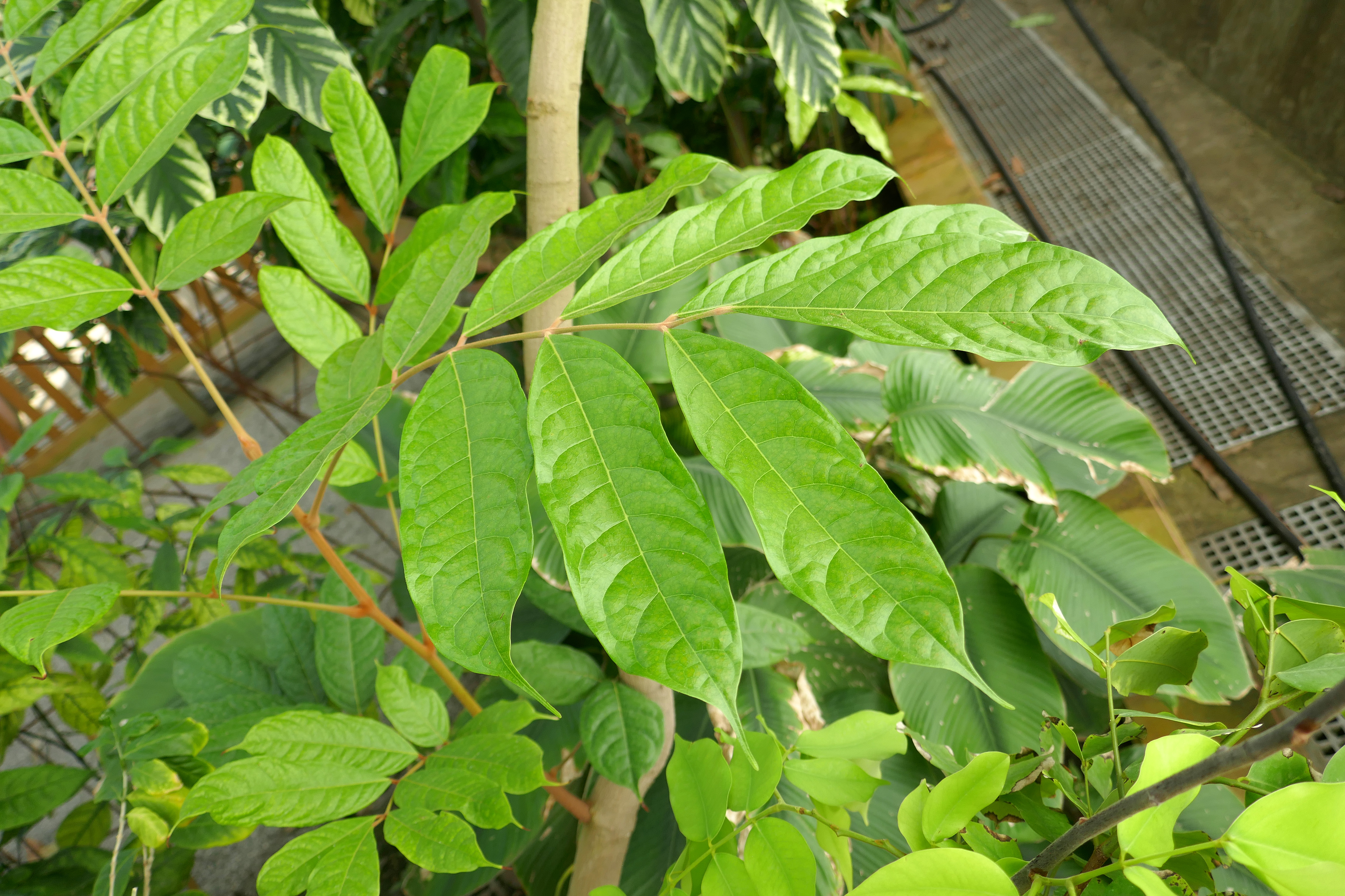 Dacryodes edulis (G.Don) Lam. fr: safoutier Afrique tropicale centrale et occidentale. Jardin botanique Meise (Belgique)